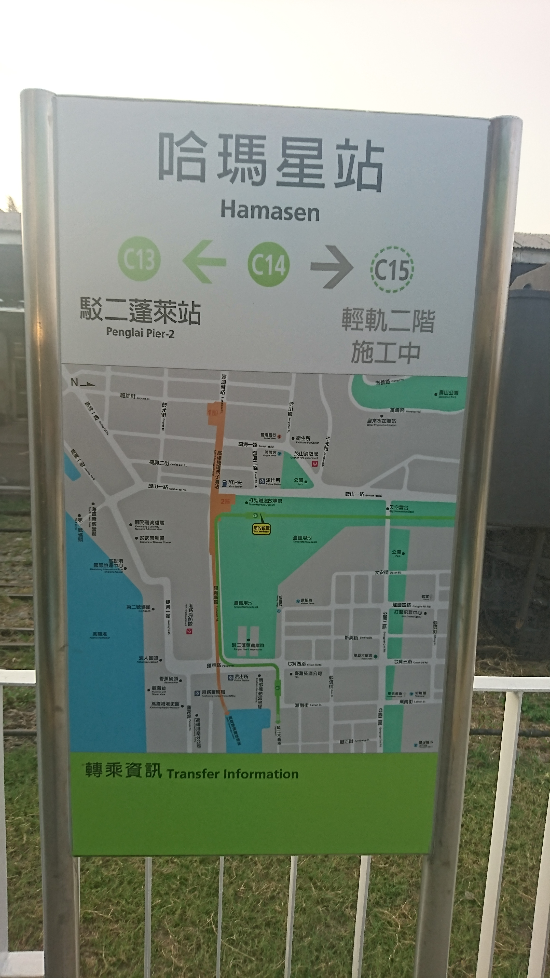 簡介哈瑪星週邊景點